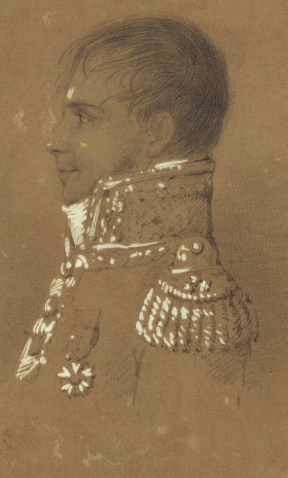 Dessin rehaussé de gouache